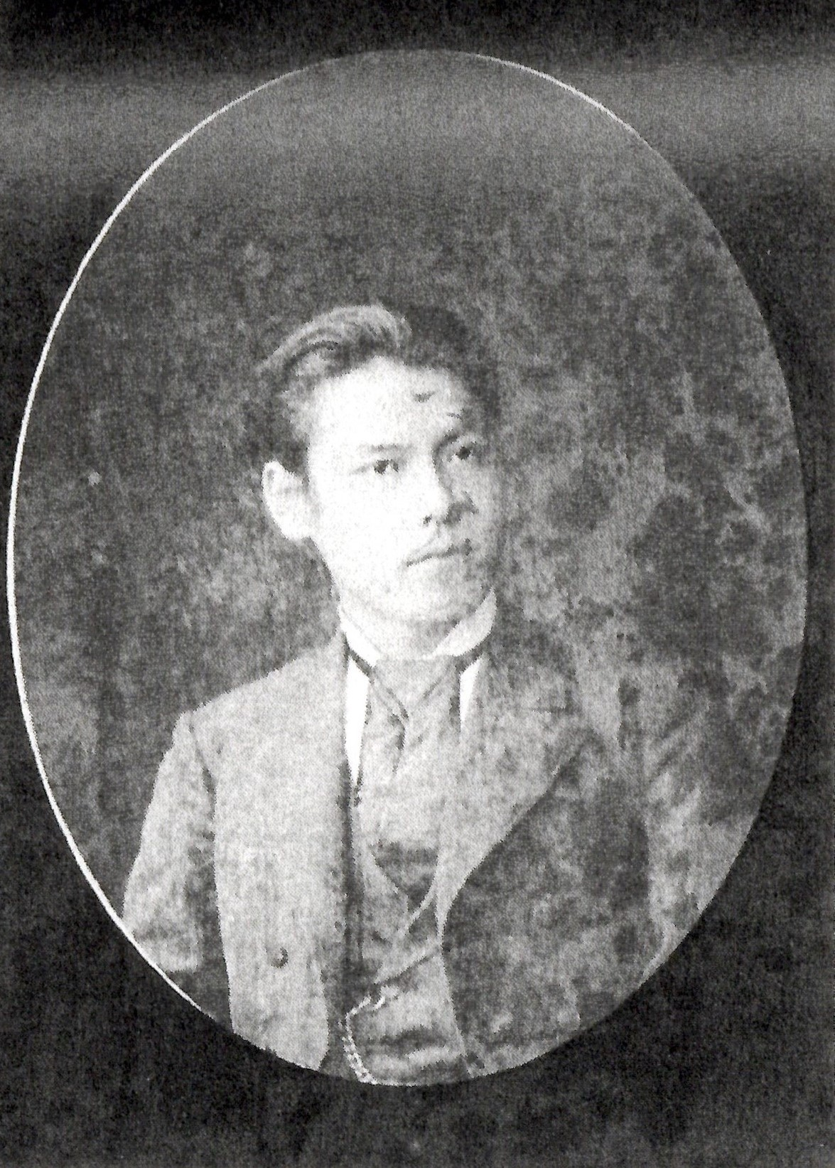 久松定弘(今治藩主松平定法の養子)の肖像写真。